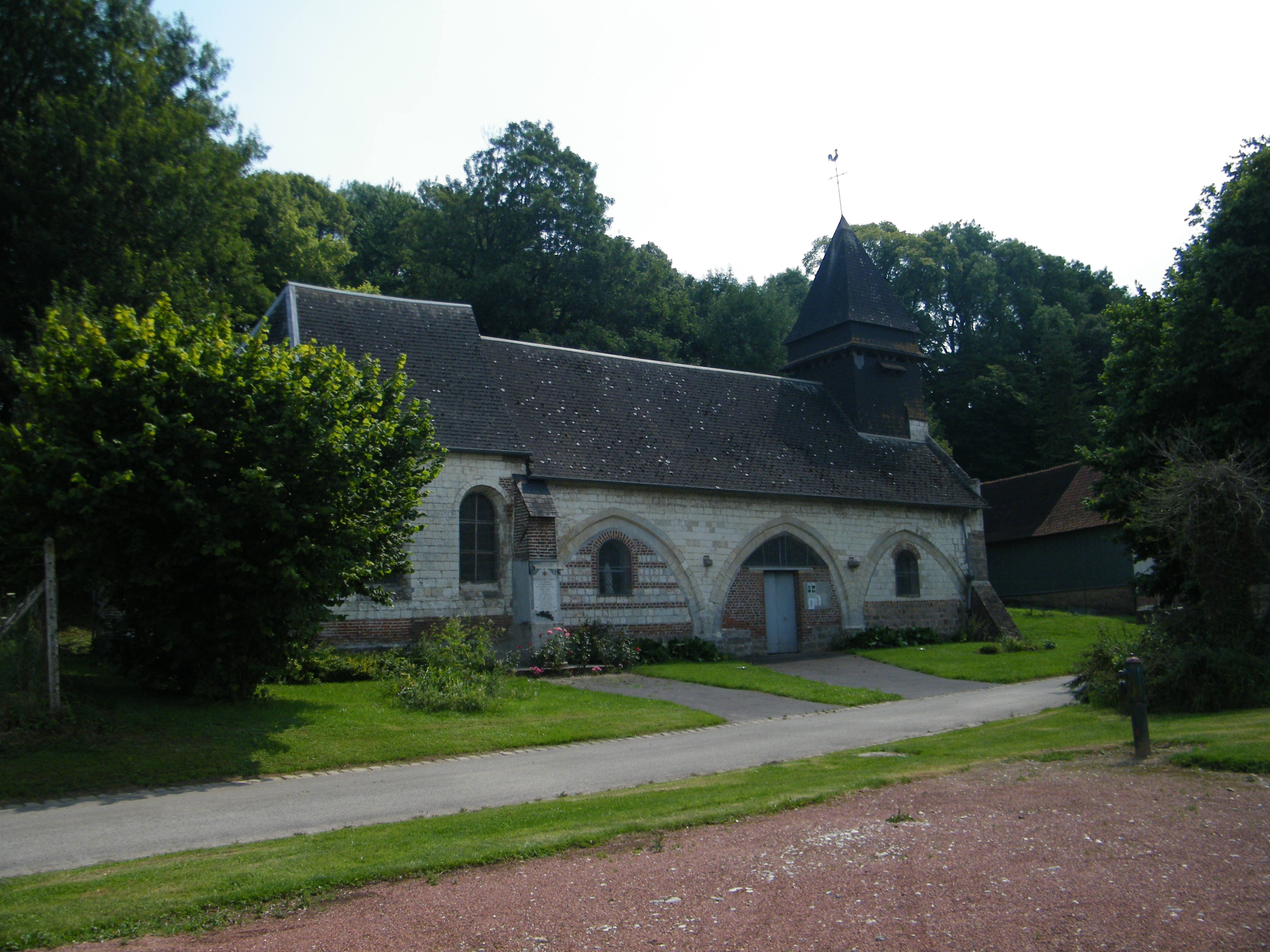 église.